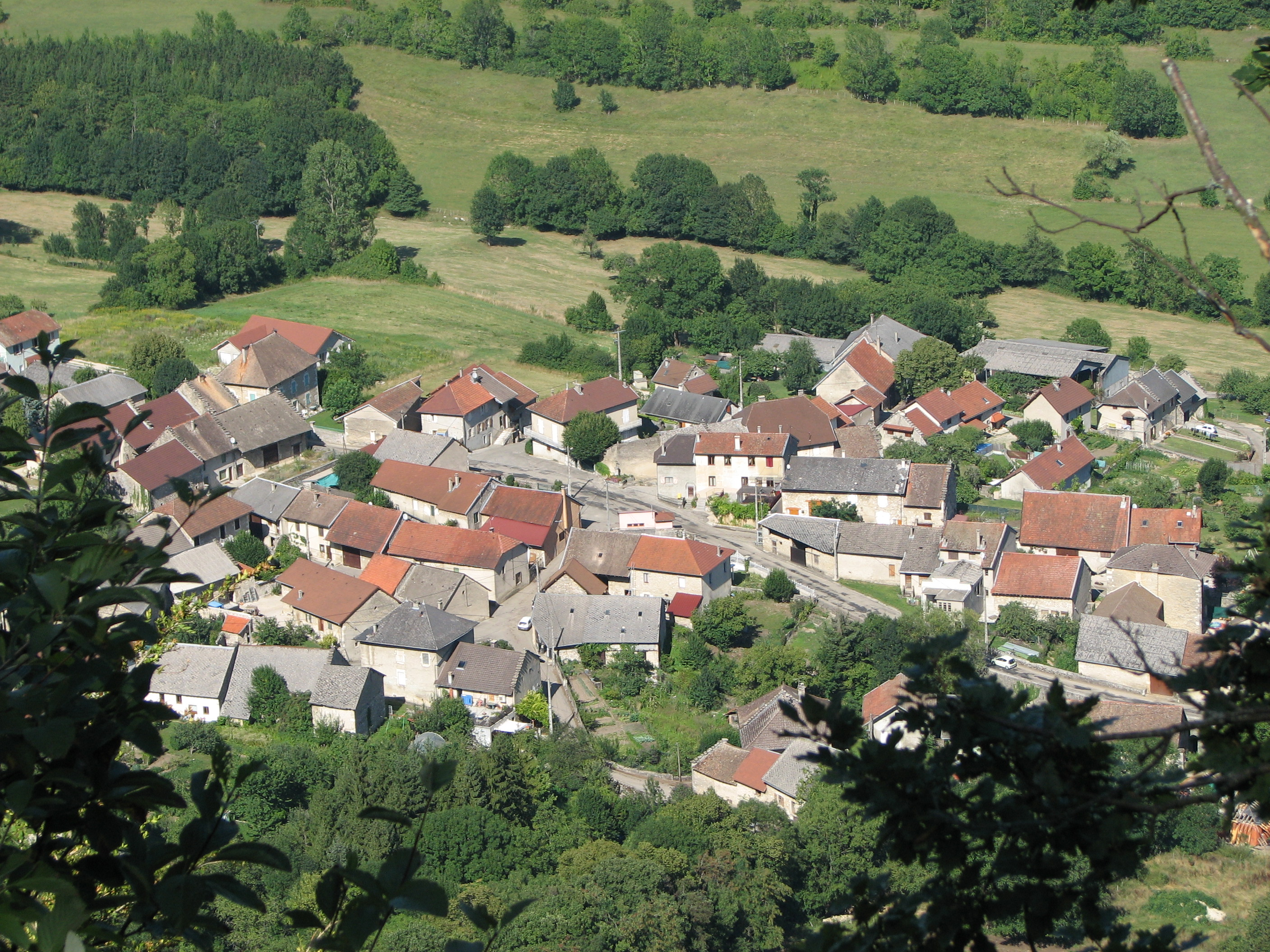 Village d'Ambléon (Ain)